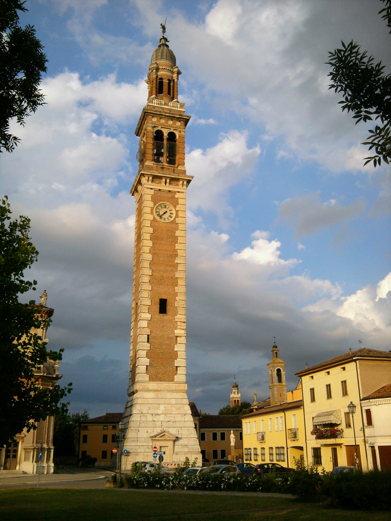 Lendinara: il campanile del Duomo di Santa Sofia.